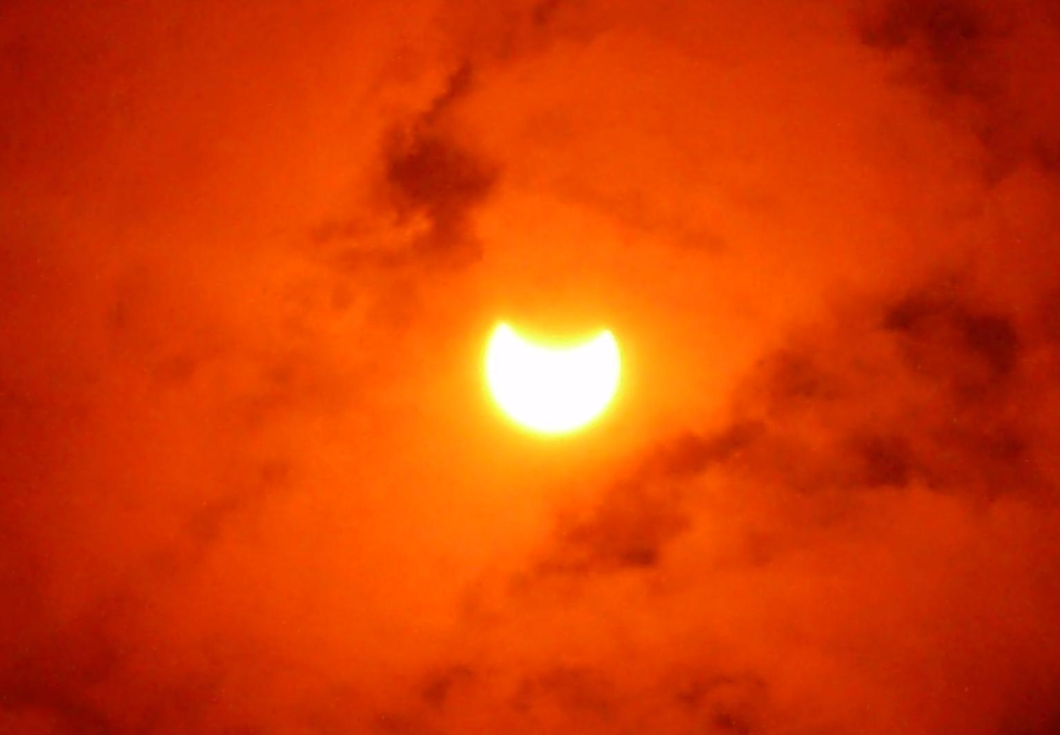 Неполное солнечное затмение 1 августа 2008 года в Пскове